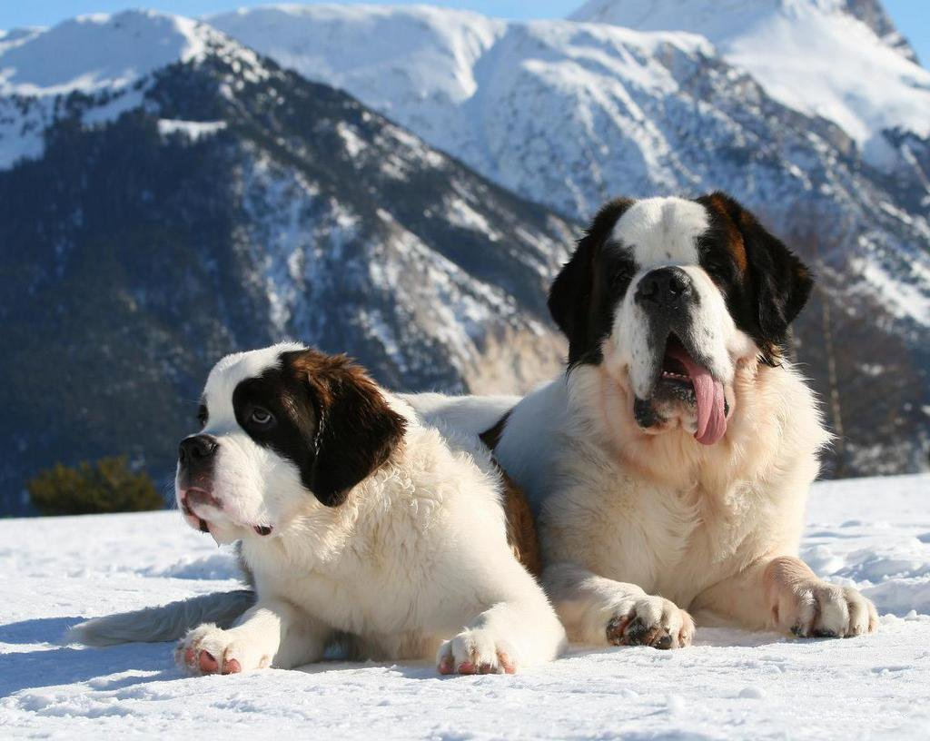 Sint Bernards langhaar